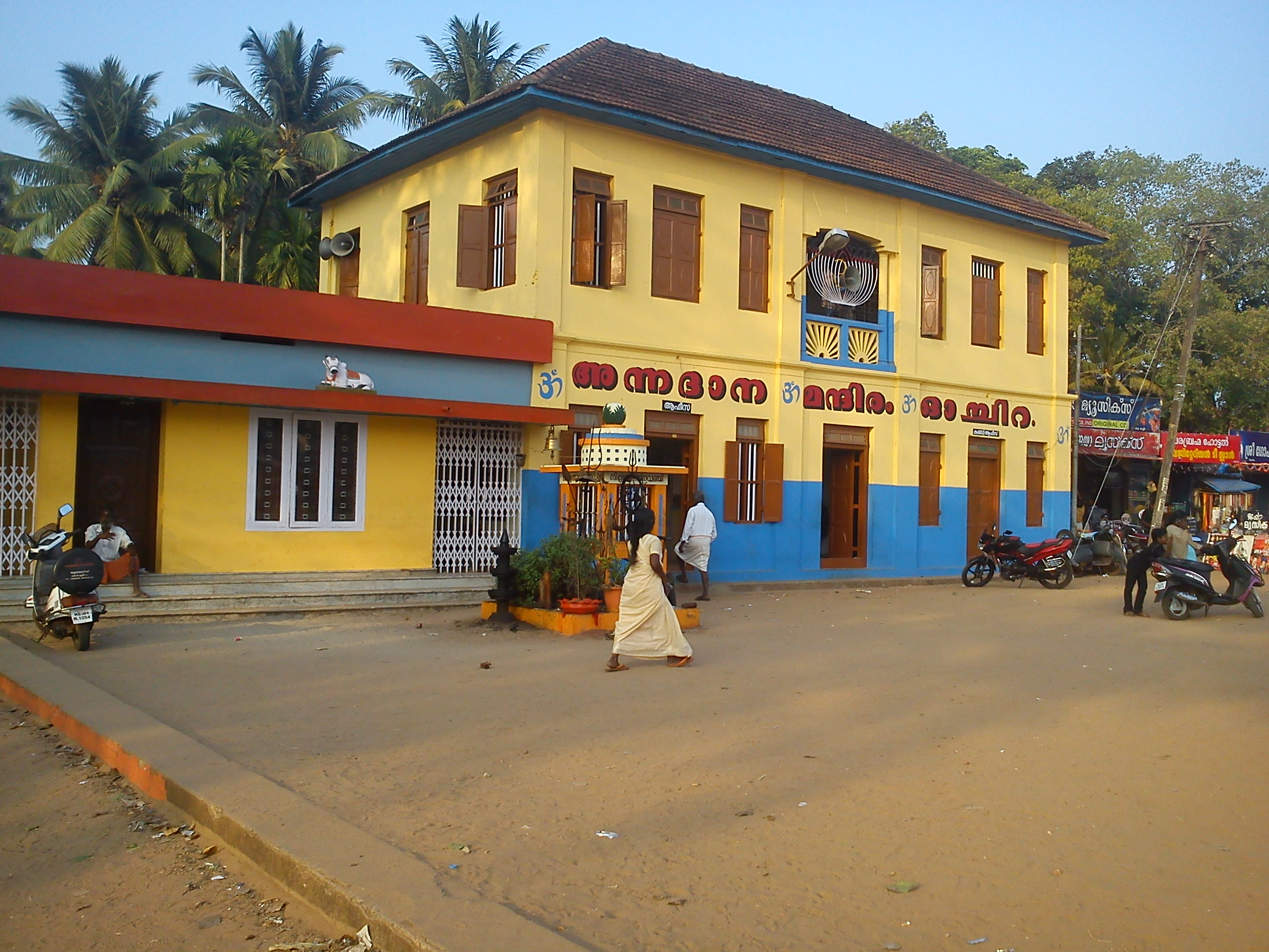 ഓച്ചിറ അന്നദാന മന്ദിരം